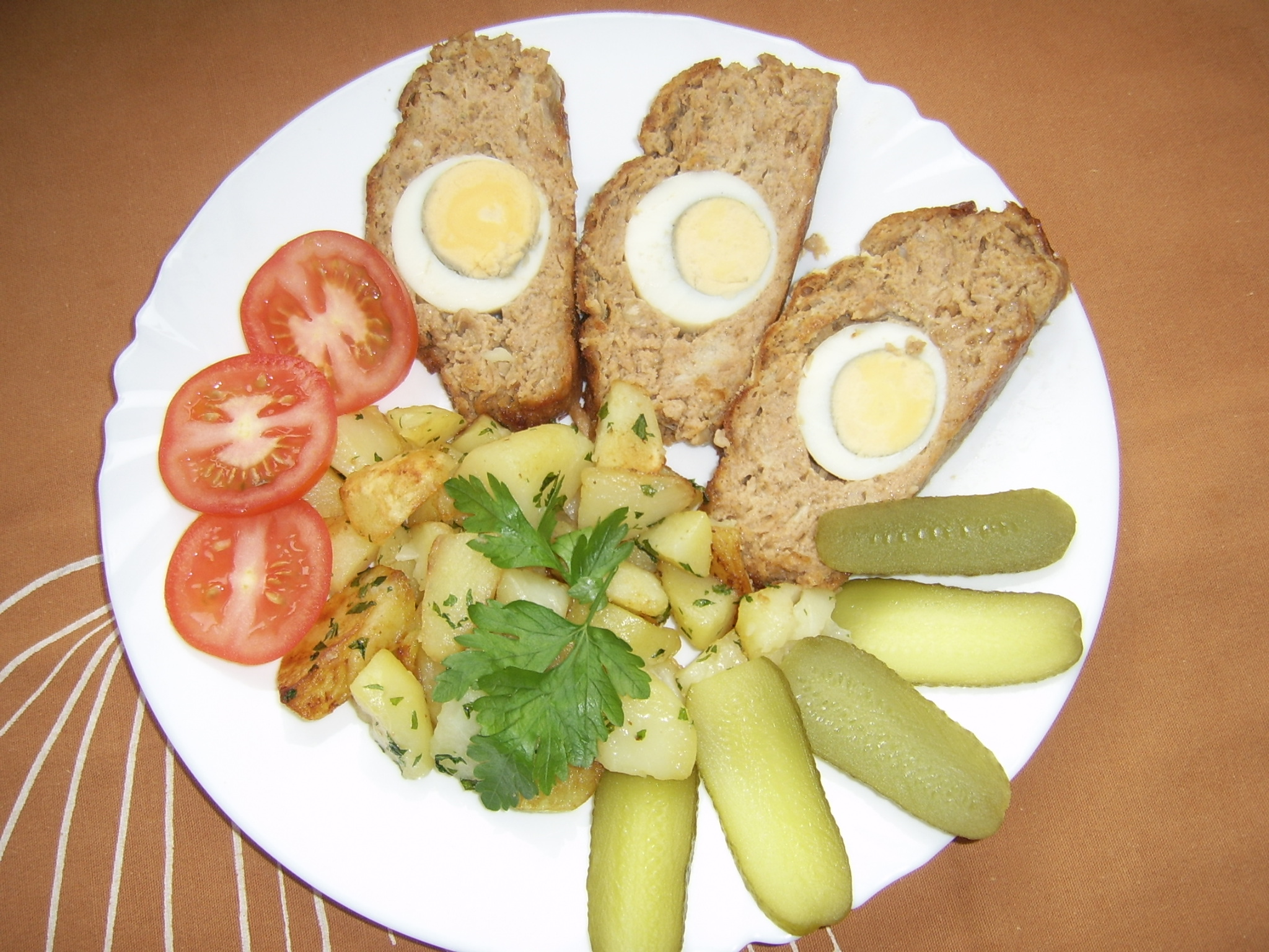 Stefánia vagdalt. A fasírtnak számtalan változata van Magyarországon, mérete a diónyitól, akár a klasszikus, darált húsból készült stefánia vagdalt méretéig terjed, ami egy egyben sütött hosszúkás fasírtmasszából készített húsétel, aminek a közepére teszik a főtt tojásokat. A Stefánia vagdalt a benne lévő főtt tojások miatt különösen húsvétkor kedvelt fasírtféleség.